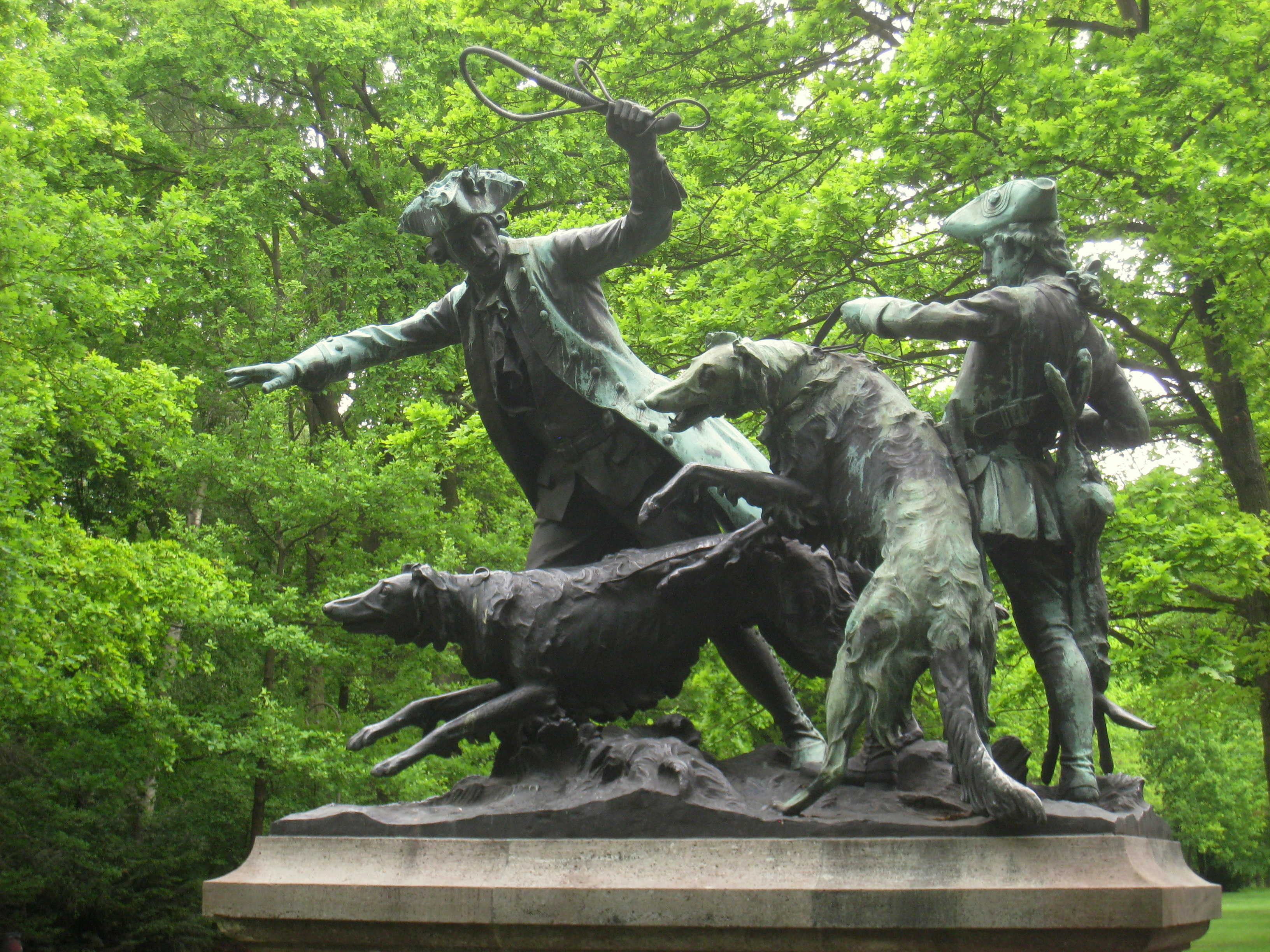 Hasenhatz der Rokokozeit by Max Baumbach, Tiergarten, Berlin, Germany.